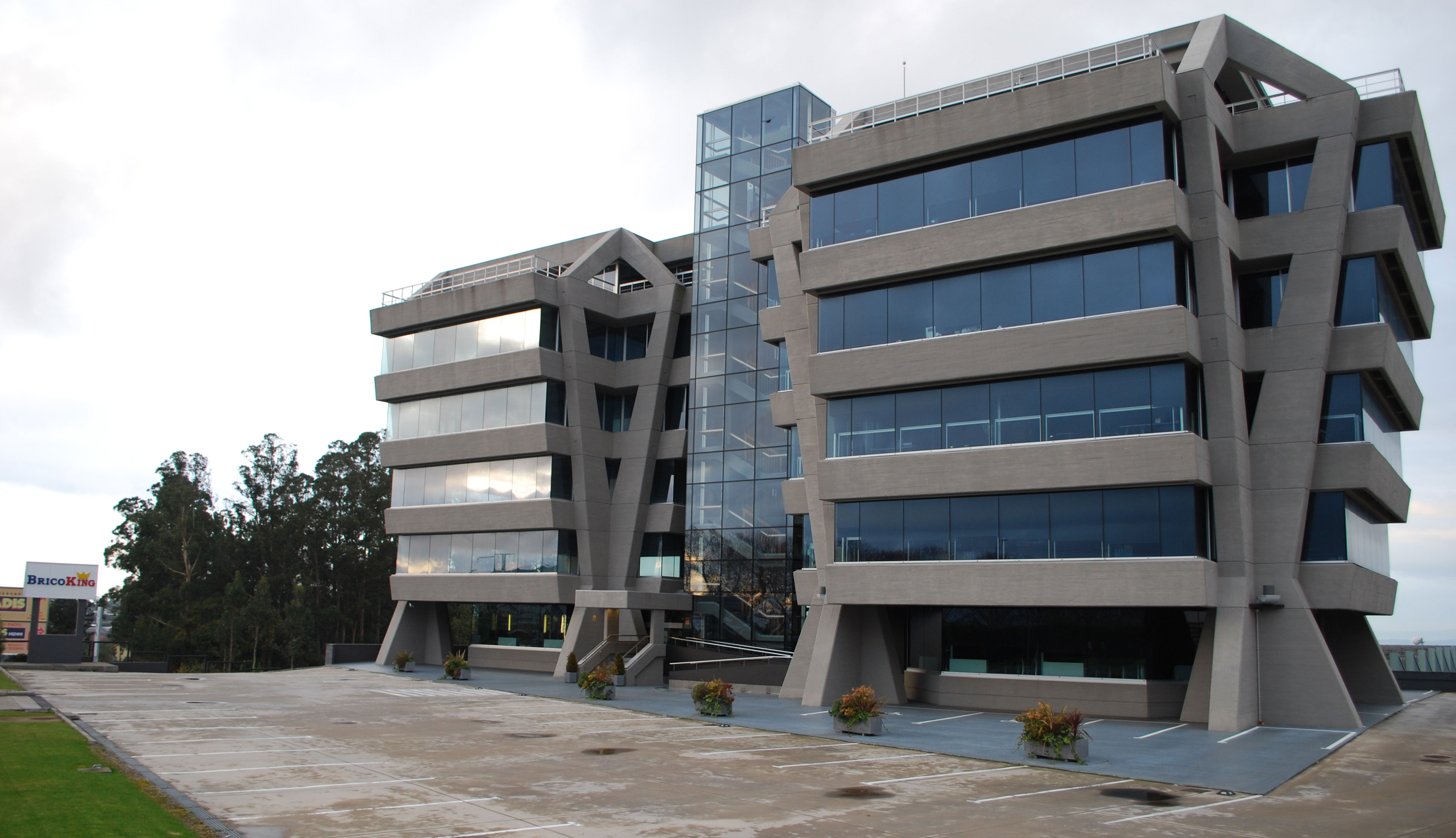 Edificio sede de Bricoking en Bergondo (Espírito Santo) A Coruña Galiza Spain